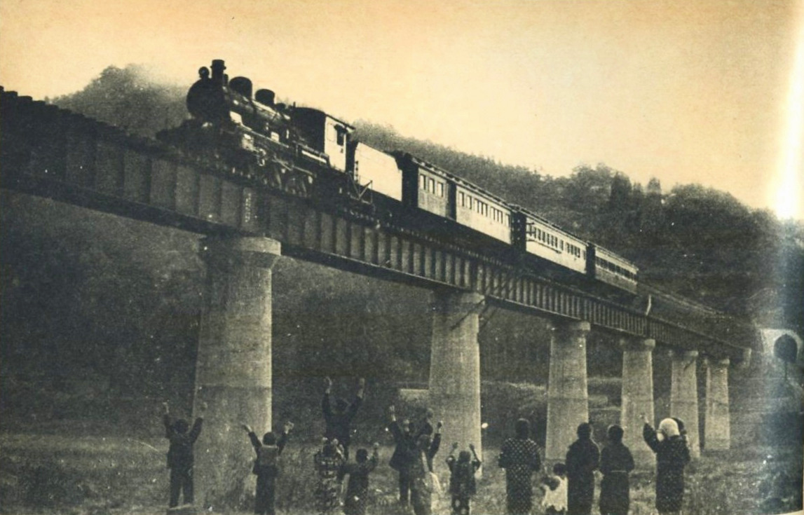 昭和9年11月15日、久大線(久大本線)全通を鉄橋の下で喜ぶ人たち。出典書籍には書かれていないが、この日開通したのは日田駅 - 天ヶ瀬駅間。撮影場所不明。